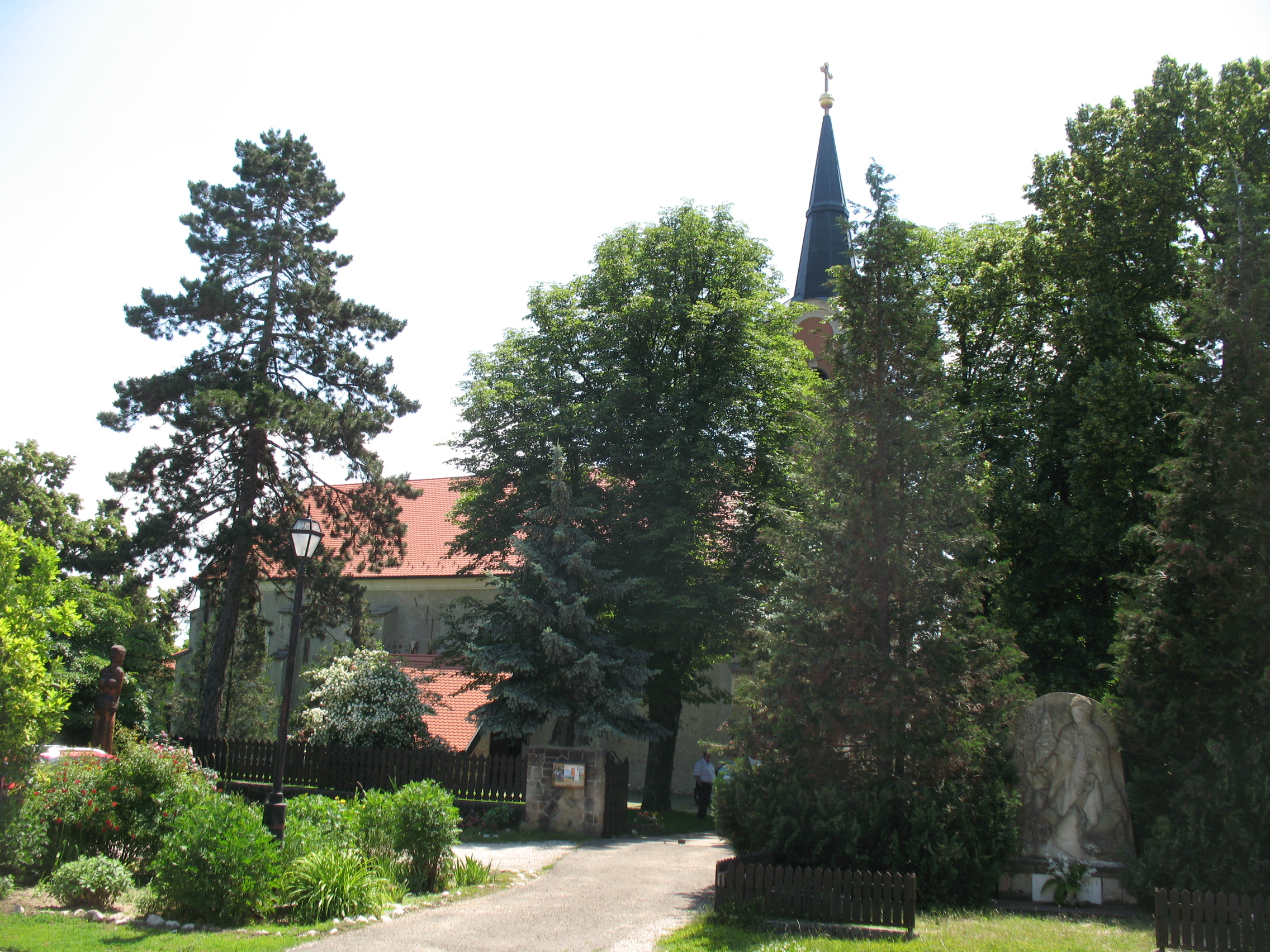 Kosd 2013